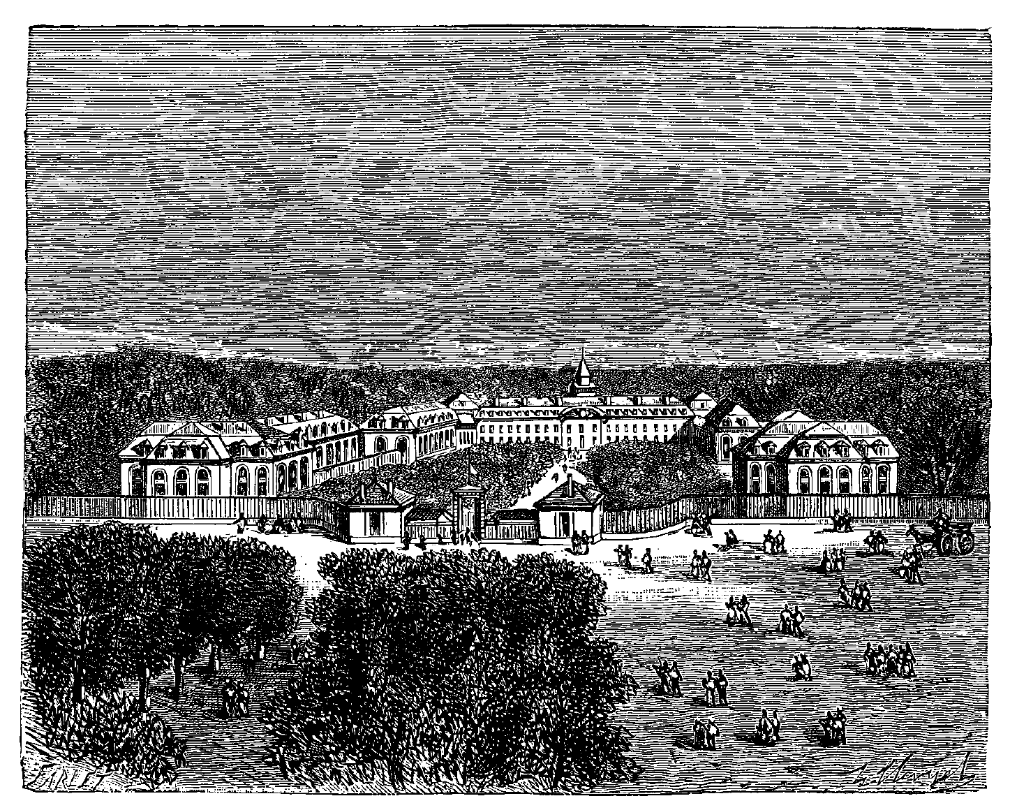 L'hôpital de la Marine de Rochefort. Extrait de La France illustrée, géographie, histoire, administration, statistique, etc., tome I, par V.-A. Malte-Brun.